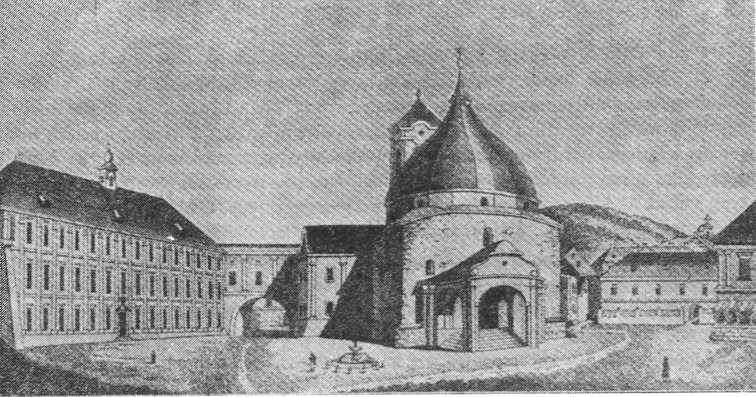 A képen a Ciszterci Rend Nagy Lajos Gimnáziumát és a Gázi Kászim pasa dzsámiját összekötő átjáró látható. Ezt 1862-ben lebontották.